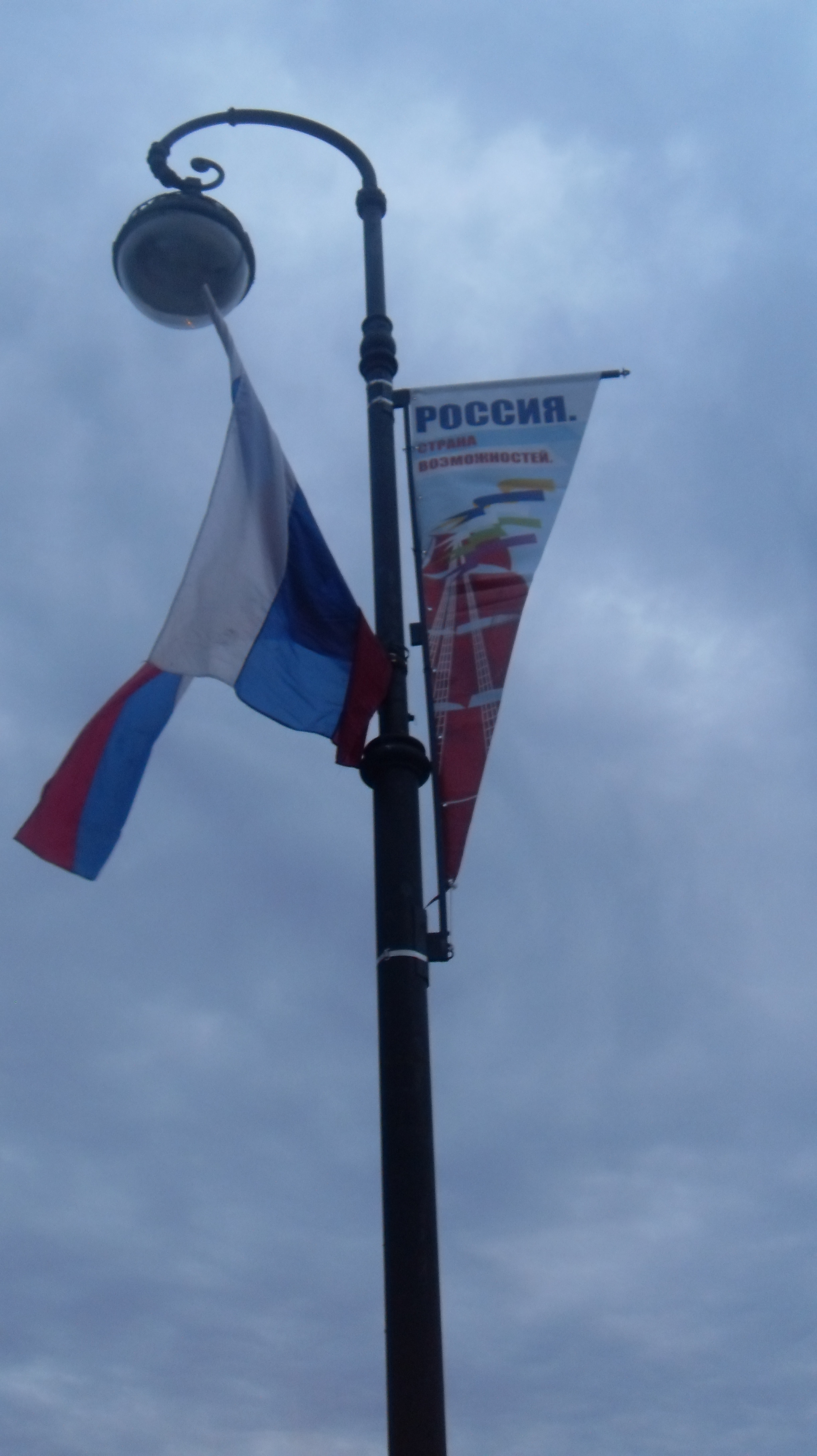 Фотография с празднования праздника "Алые паруса" в Санкт-Петербурге в 2010 году.